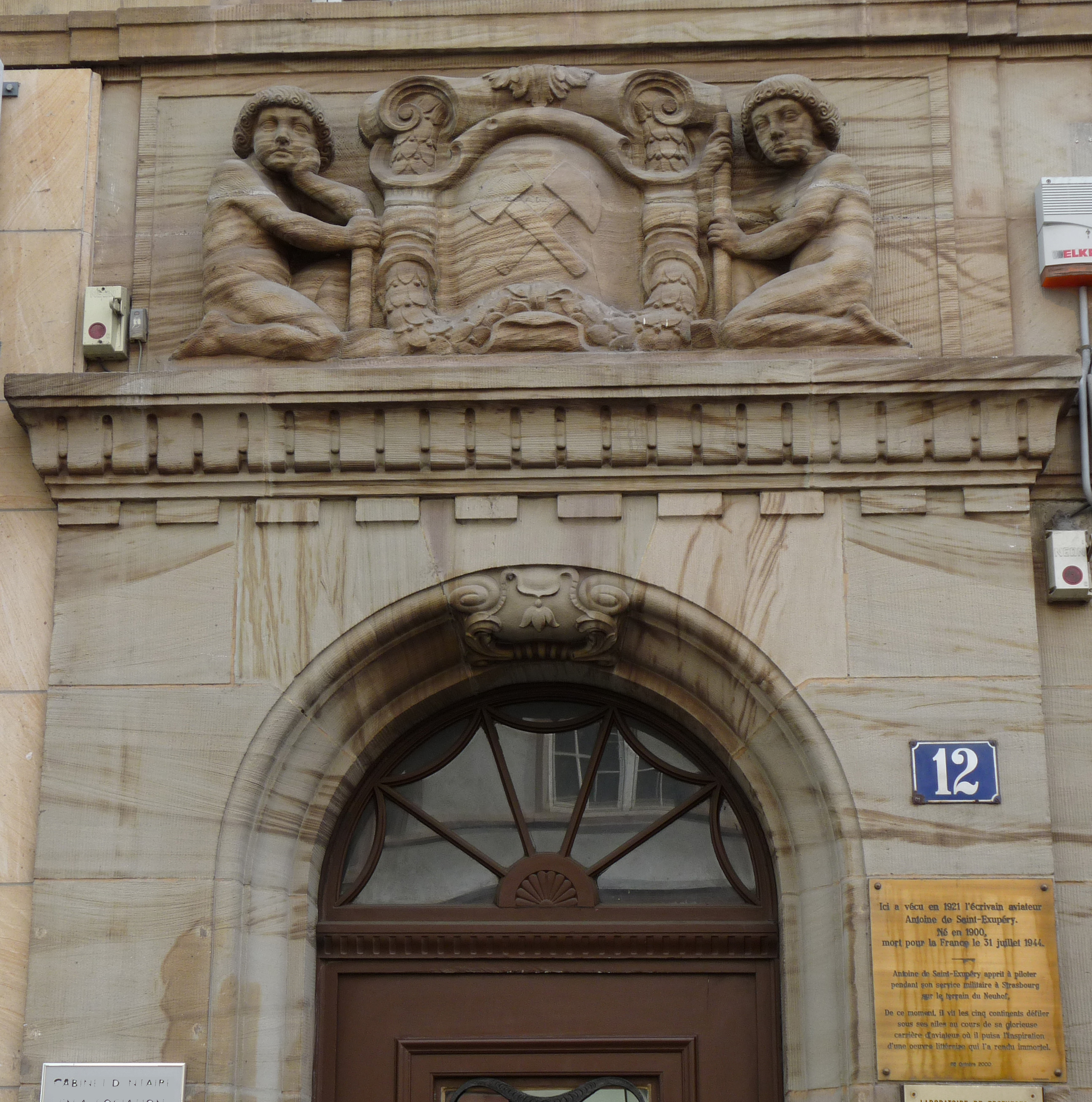 Plaque commémorant le séjour d'Antoine de Saint-Exupéry à Strasbourg en 1921, au n° 12 de la rue du 22 Novembre